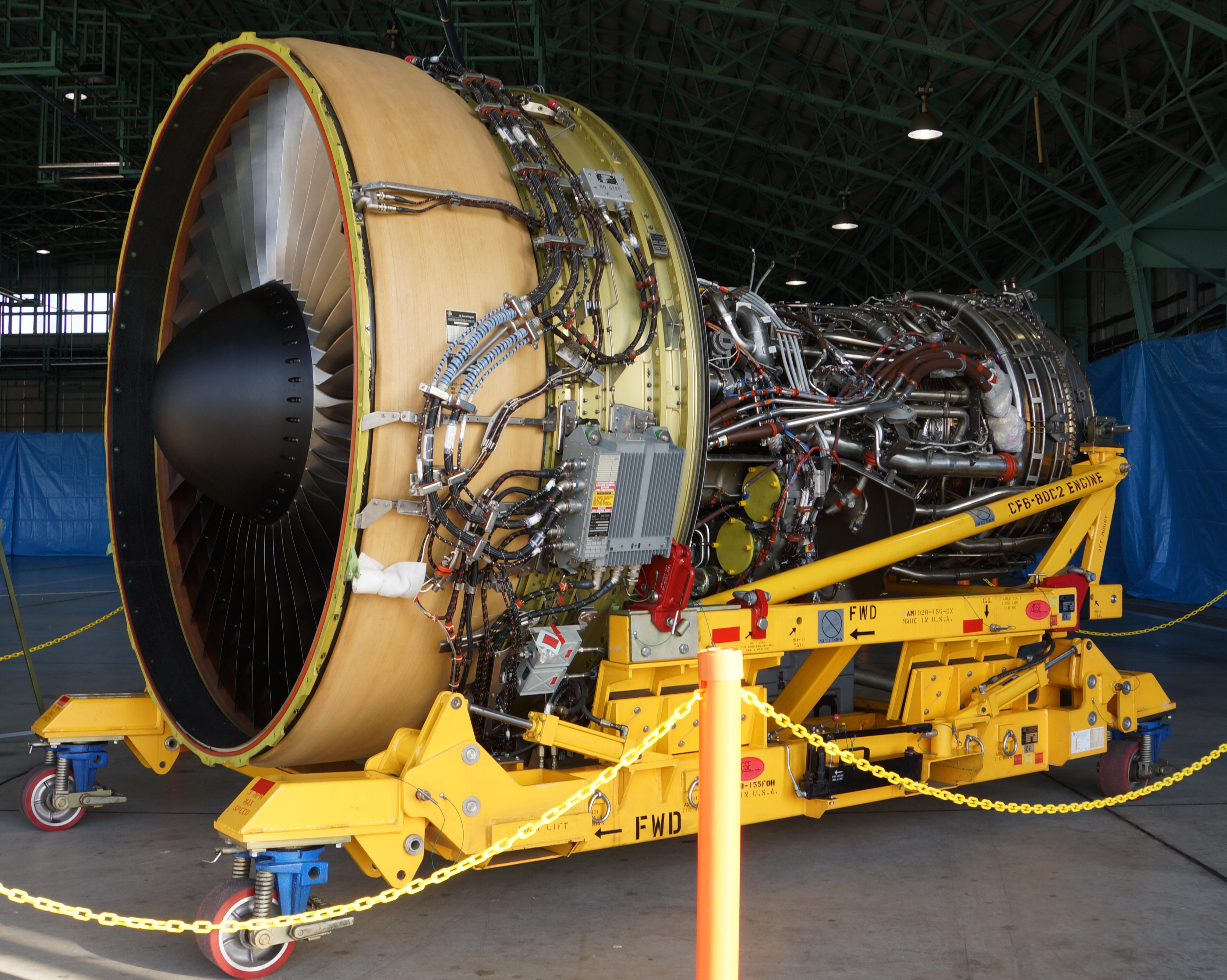 C-2輸送機用 CF6-80C2K1Fターボファン・エンジン。2016年10月30日 航空自衛隊岐阜基地にて。